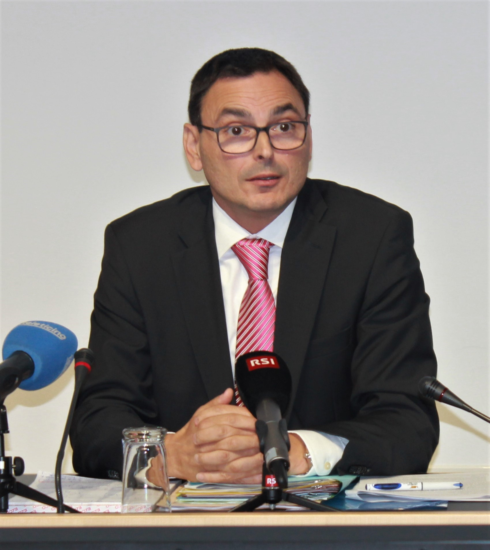 Raffaele De Rosa, consigliere di Stato del Cantone Ticino, durante una conferenza stampa